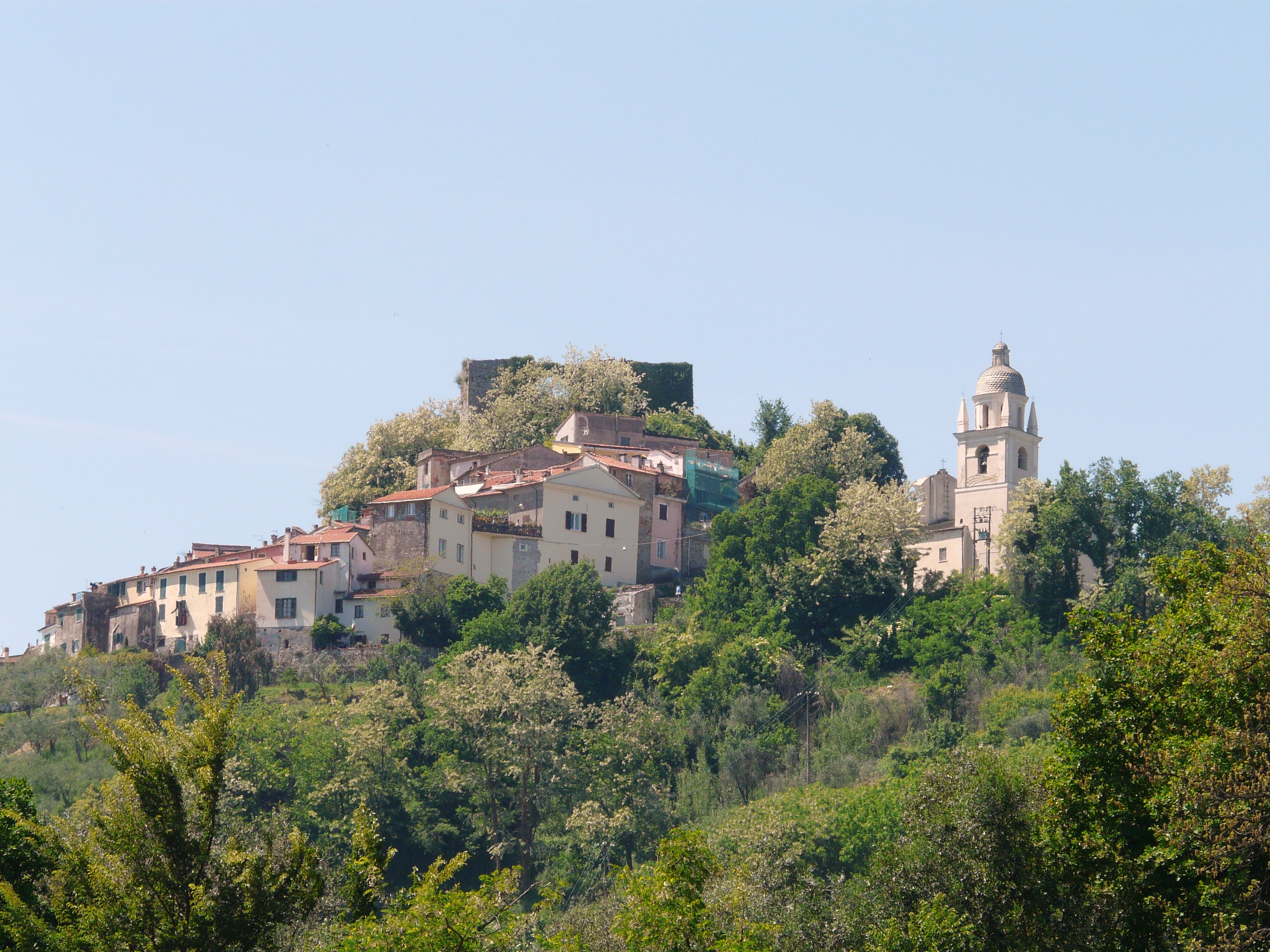 Panorama di Trebiano Magra, Arcola, Liguria, Italia